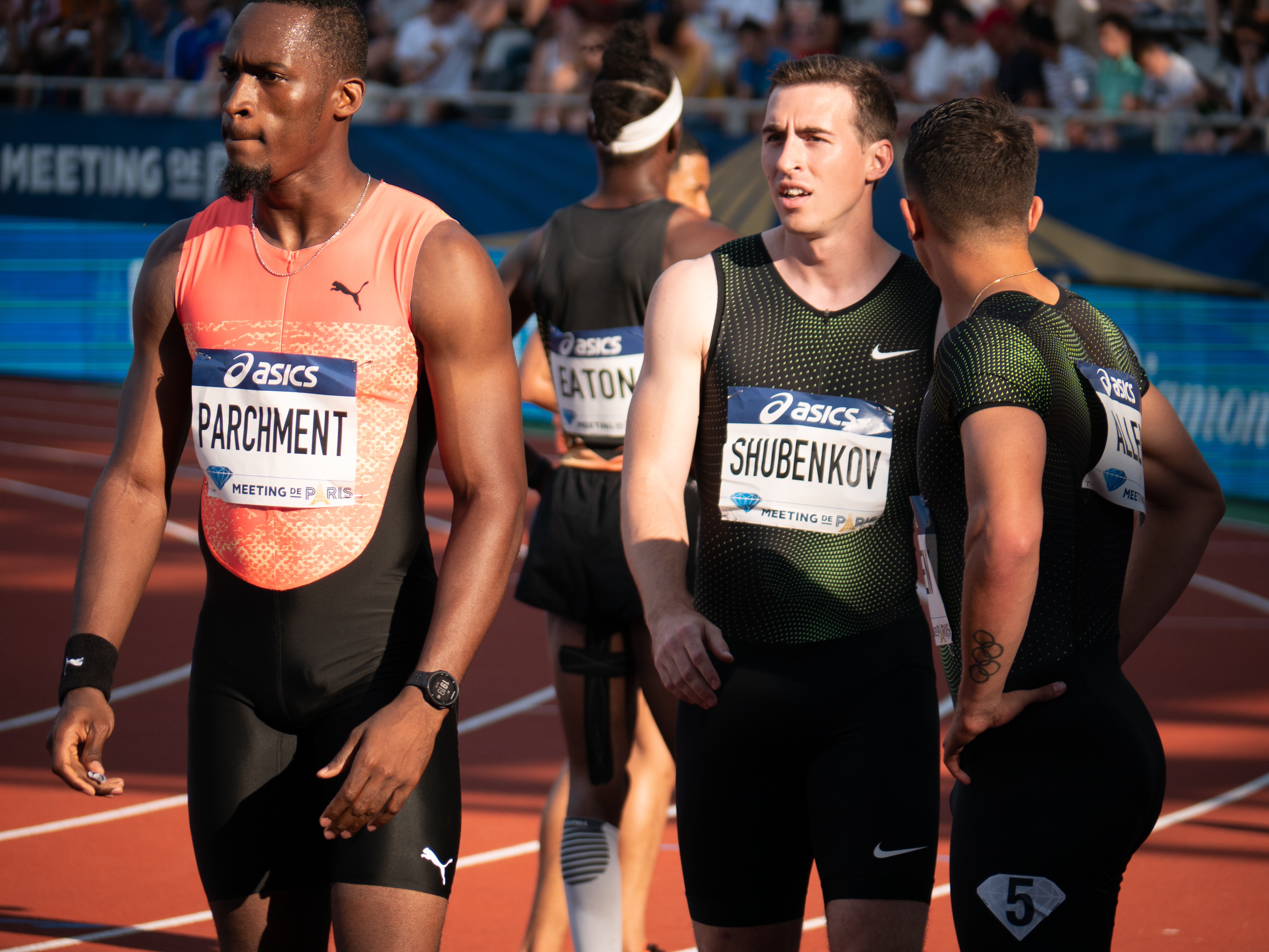 110m haies hommes